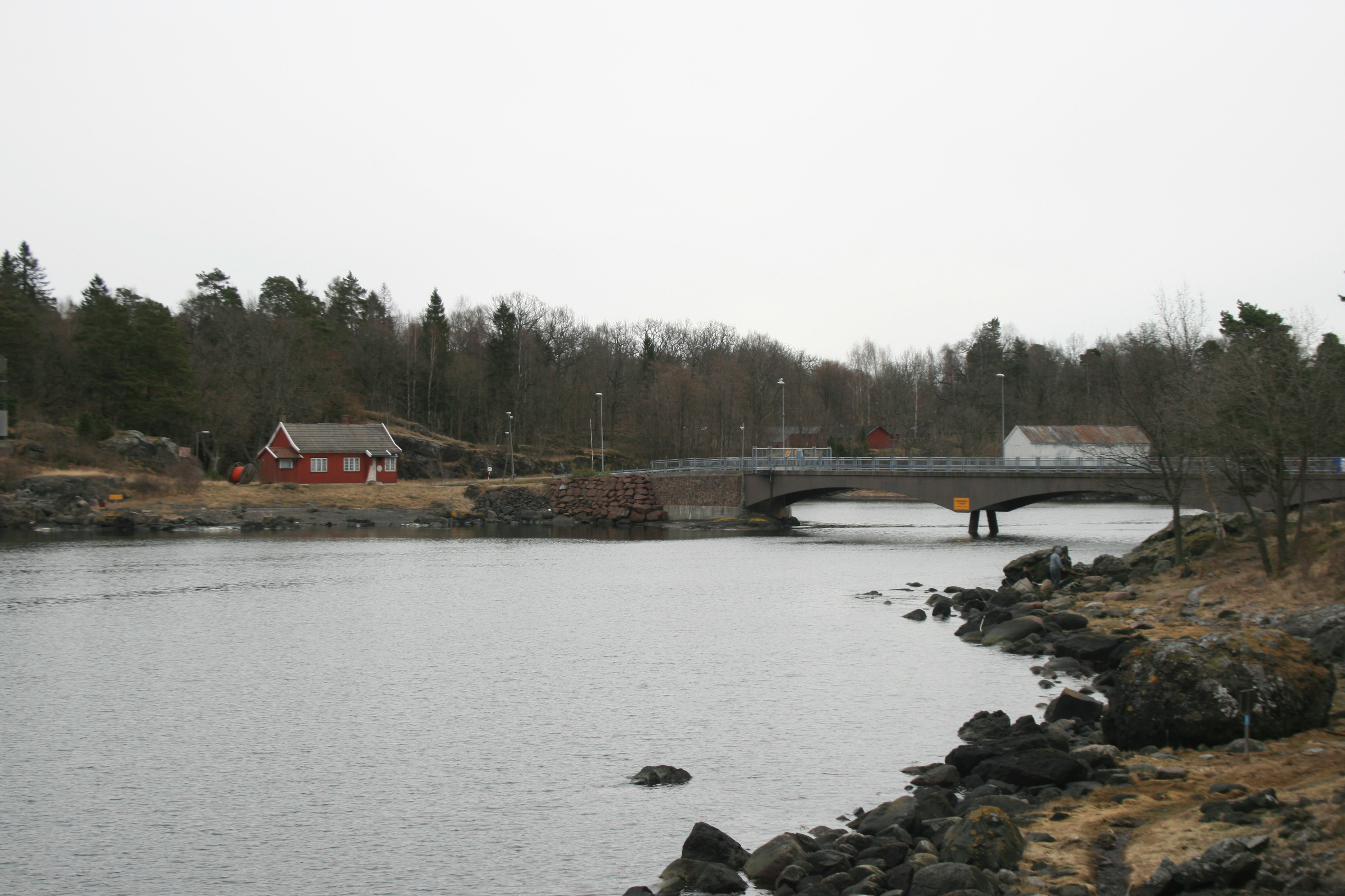 Broen over til Mellomøya.